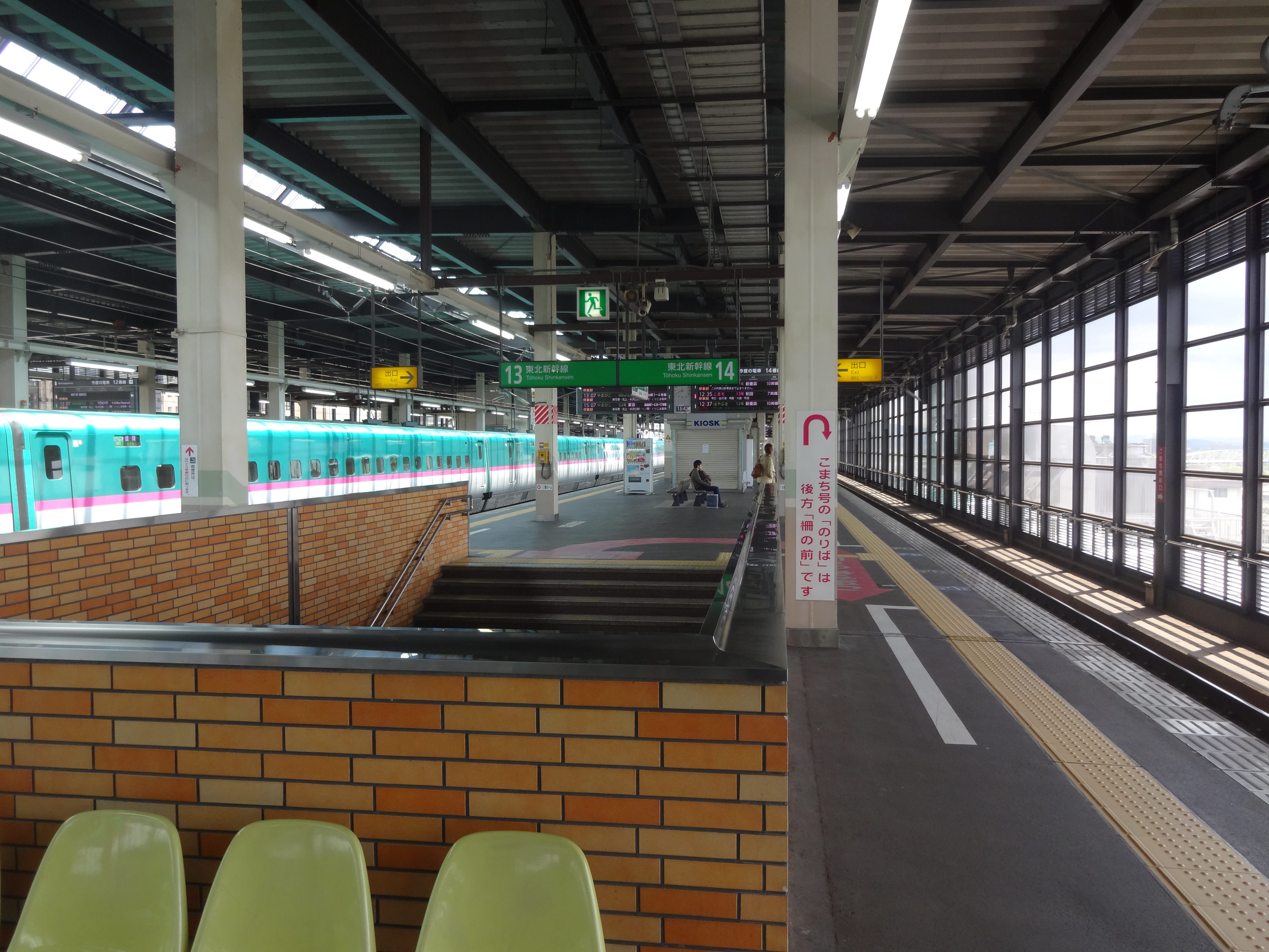 盛岡駅新幹線ホーム